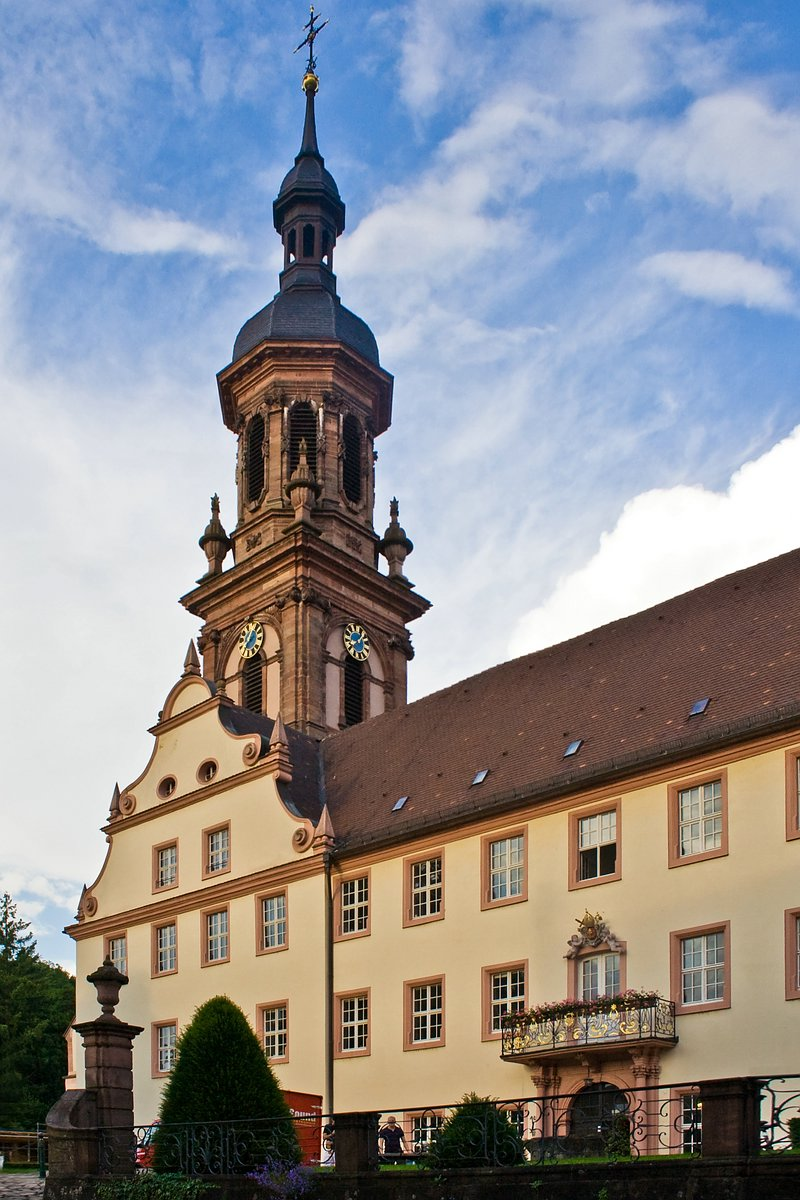 Dies ist der Campus Gengenbach, der zur Hochschule Offenburg gehört.